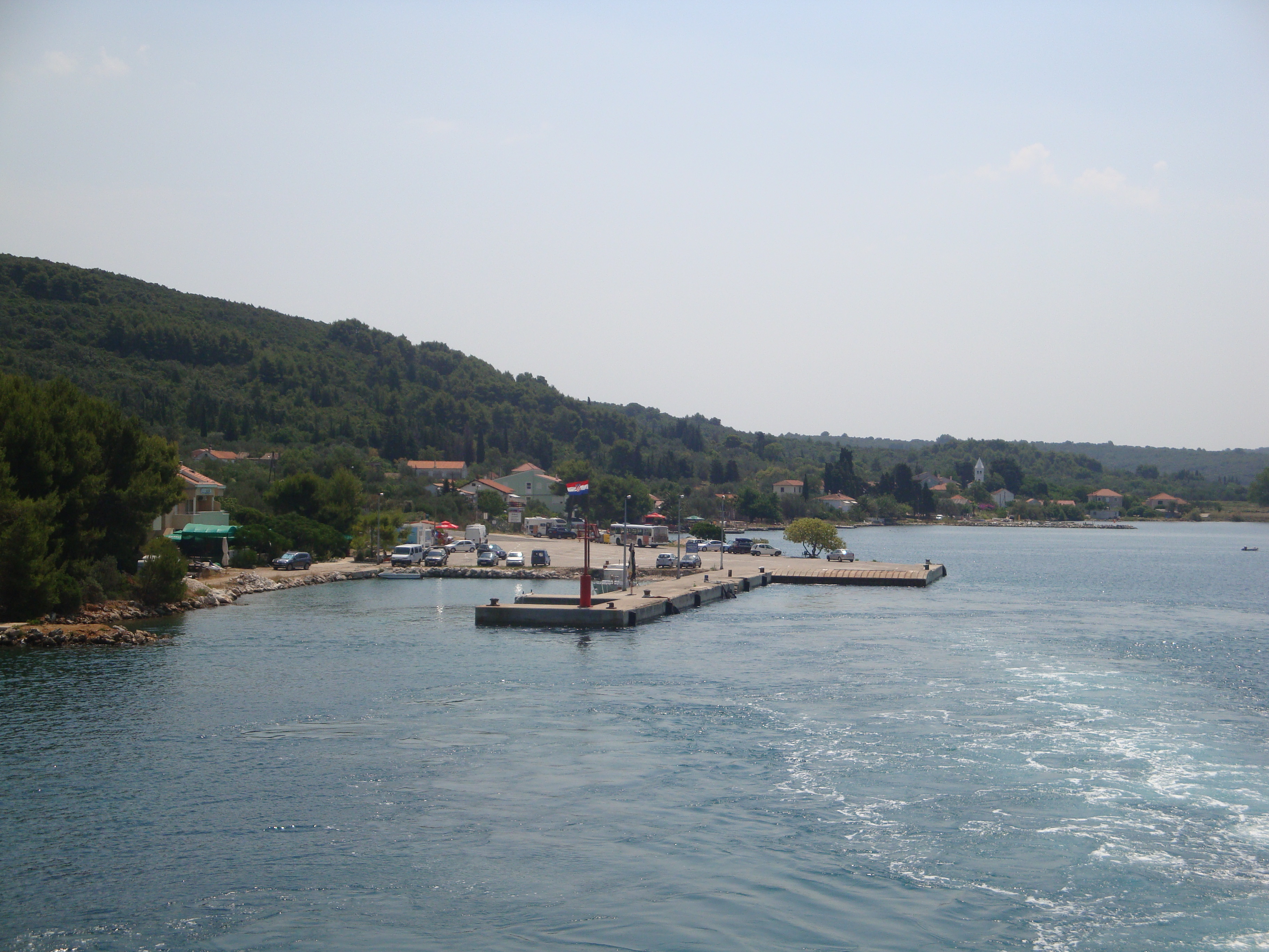 Brbinj, Dugi otok